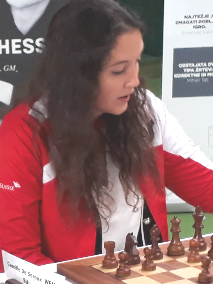 Camille de Seroux, Runde 4, Mitropa Cup 2019 Frauen, Radenci.